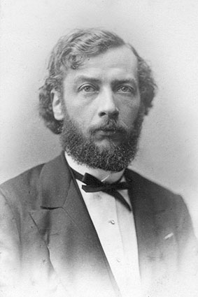 Gijsbert van Tienhoven, former Dutch prime minister